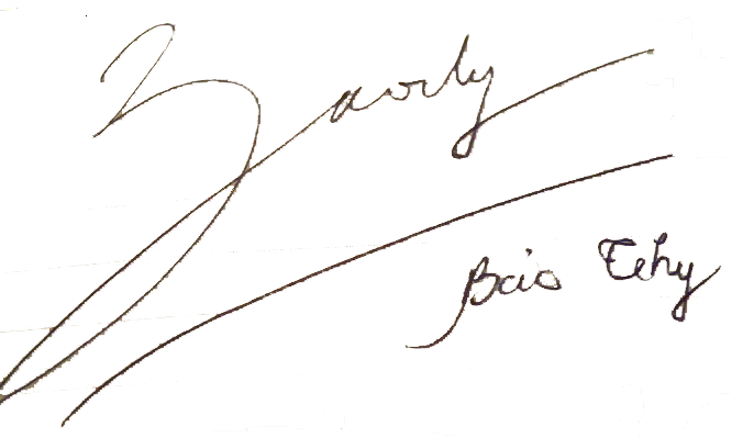 Bảo Thy